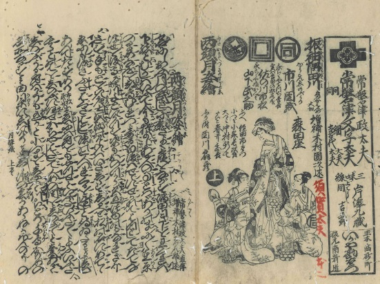 変体仮名で詞章（歌詞）が書かれた薄物正本「両顔月姿絵（双面）」。合綴本より。